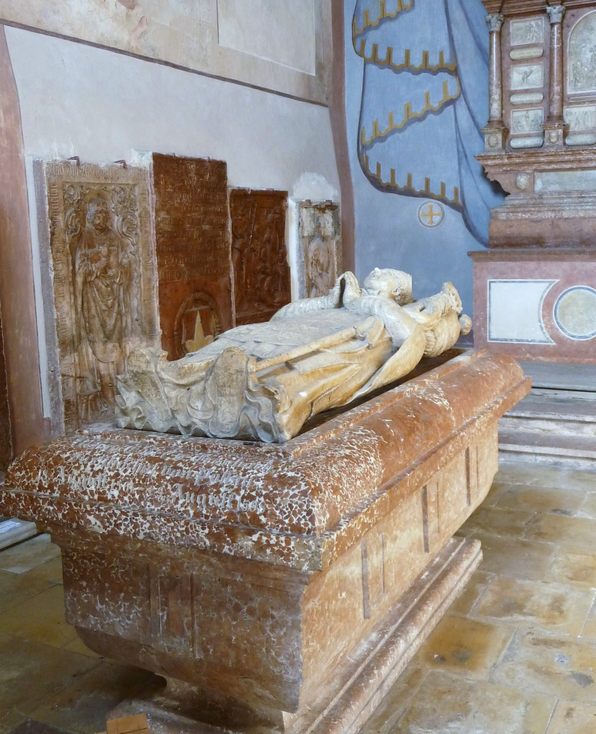 Hochgrab des Bischofs Urban von Trennbach in der Trennbachkapelle am Passauer Dom